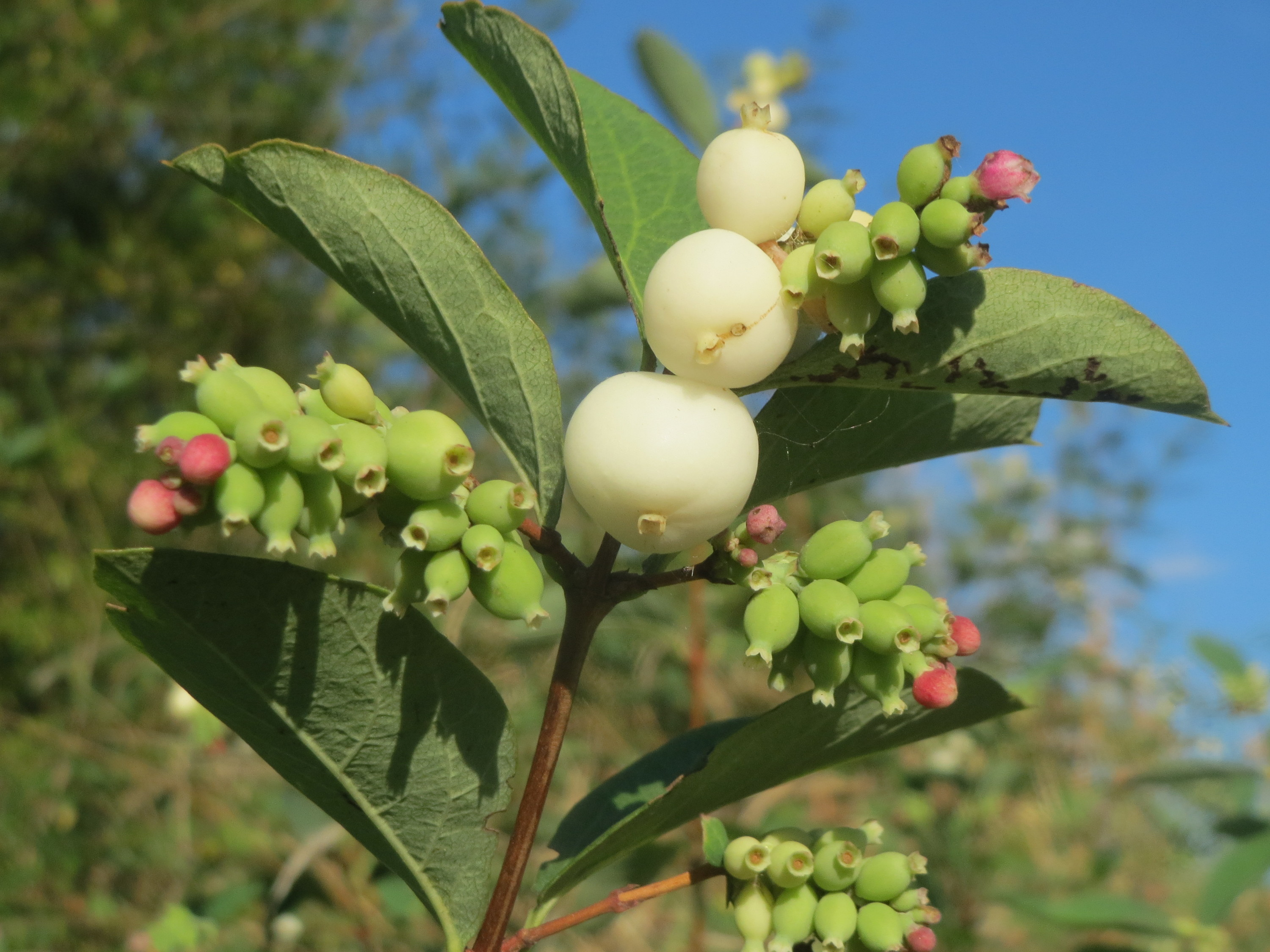 Gewöhnliche Schneebeere (Symphoricarpos albus) bei Hockenheim